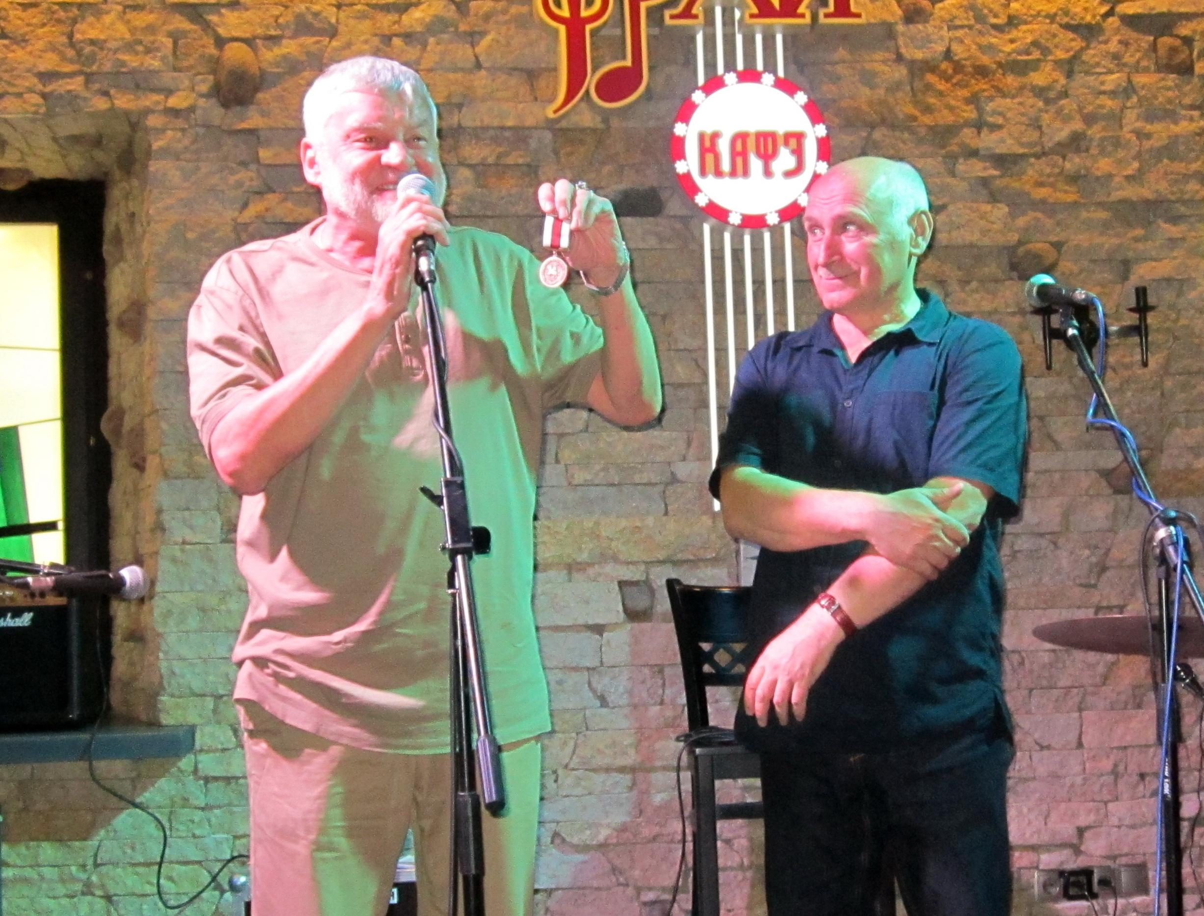 Уладзімір Арлоў узнагароджвае медалём «100 гадоў БНР» Барыса Пятровіча ад імя старшыні Рады БНР Івонкі Сурвілы. Літаратурна-музычная вечарына, прысвечаная выхаду 100-га нумару часопіса «Дзеяслоў»